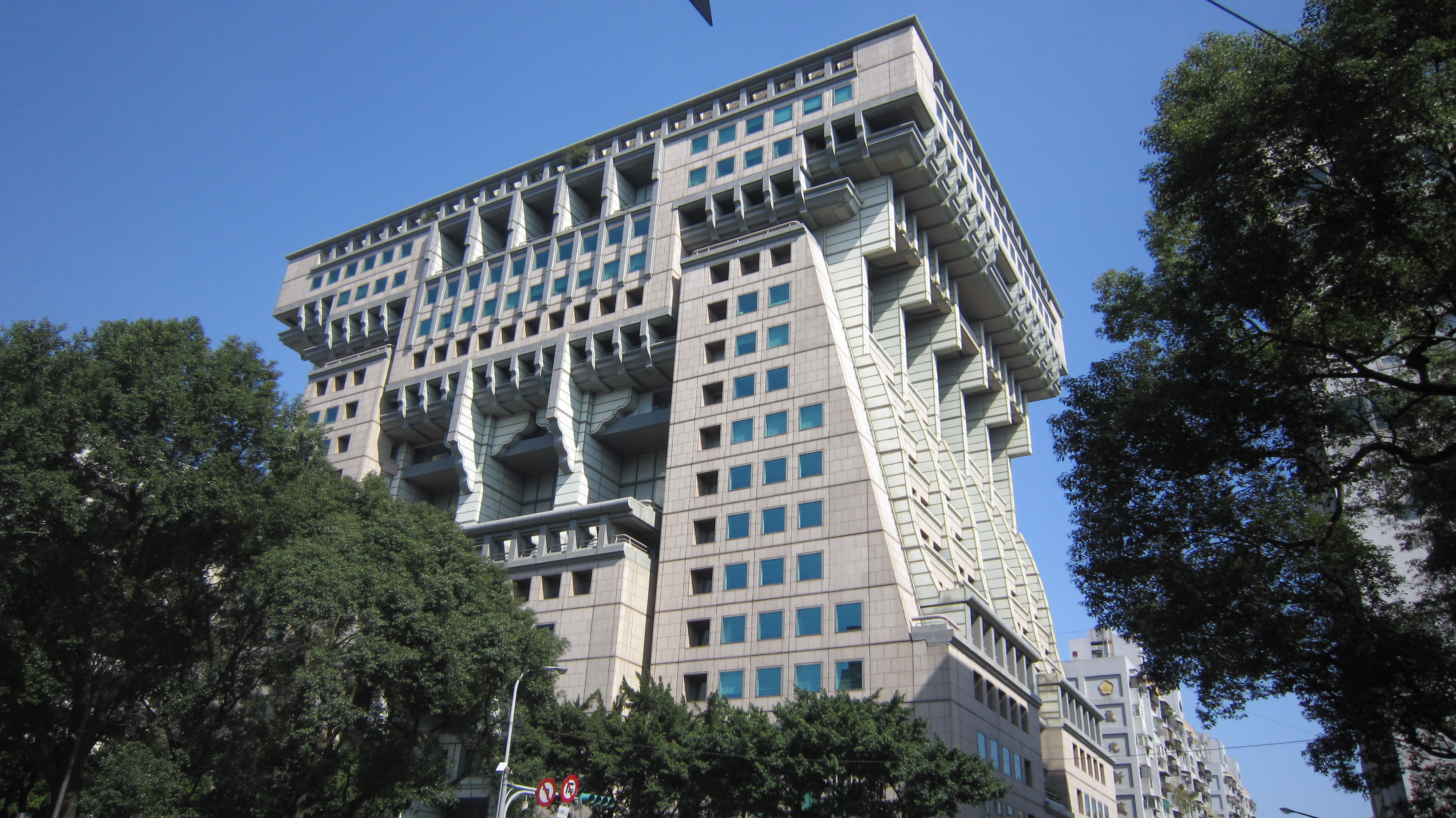 宏國大樓。